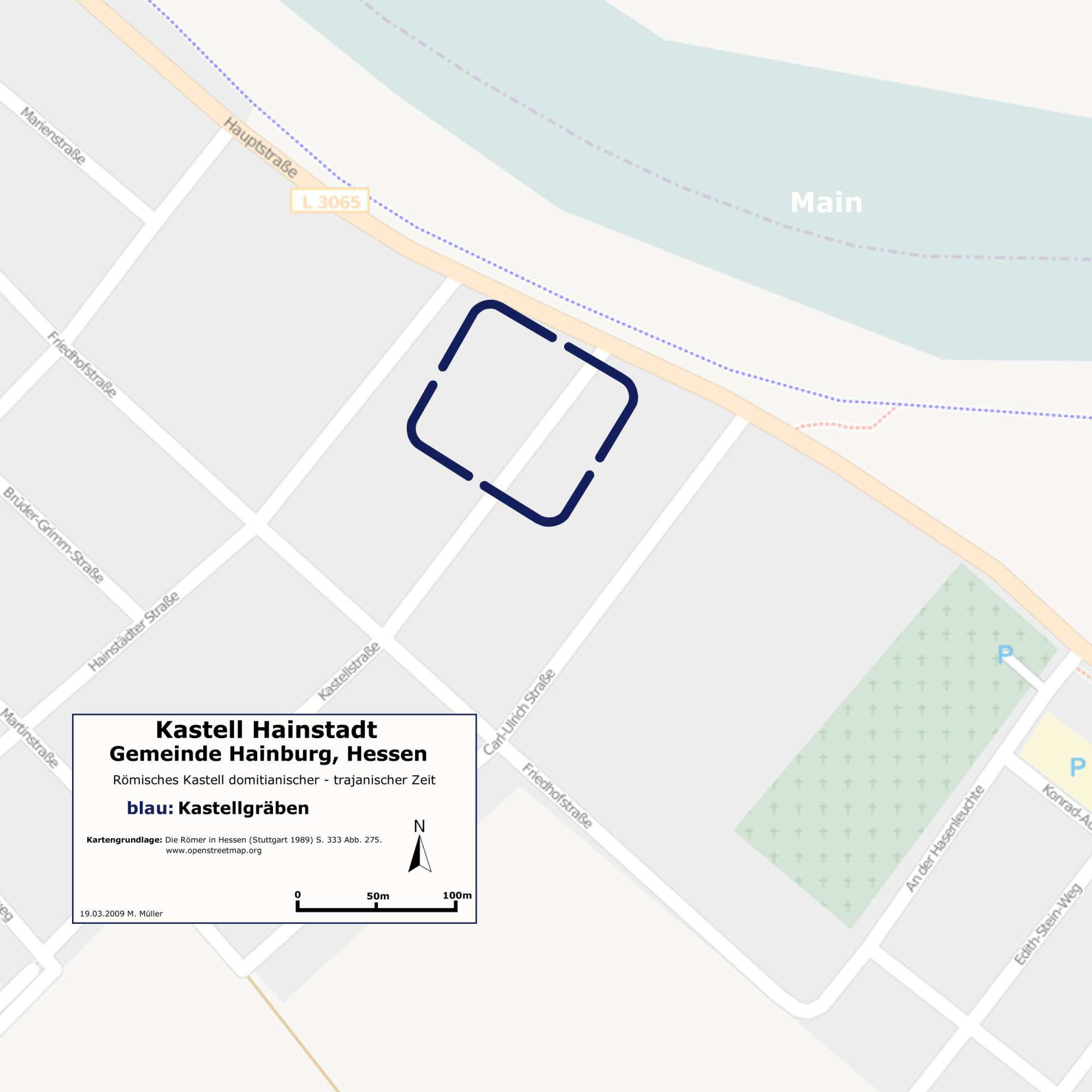 Kastell Hainstadt, Gem. Hainburg, Hessen. Römisches Kastell domitianisch-trajanischer Zeit, Lageplan.